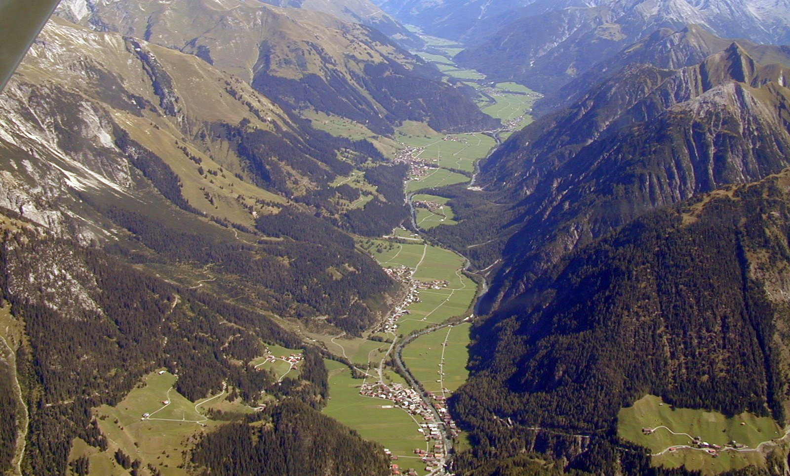 Luftaufnahme oberes Lechtal